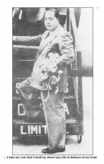 डॉ. बाबासाहेब आंबेडकर